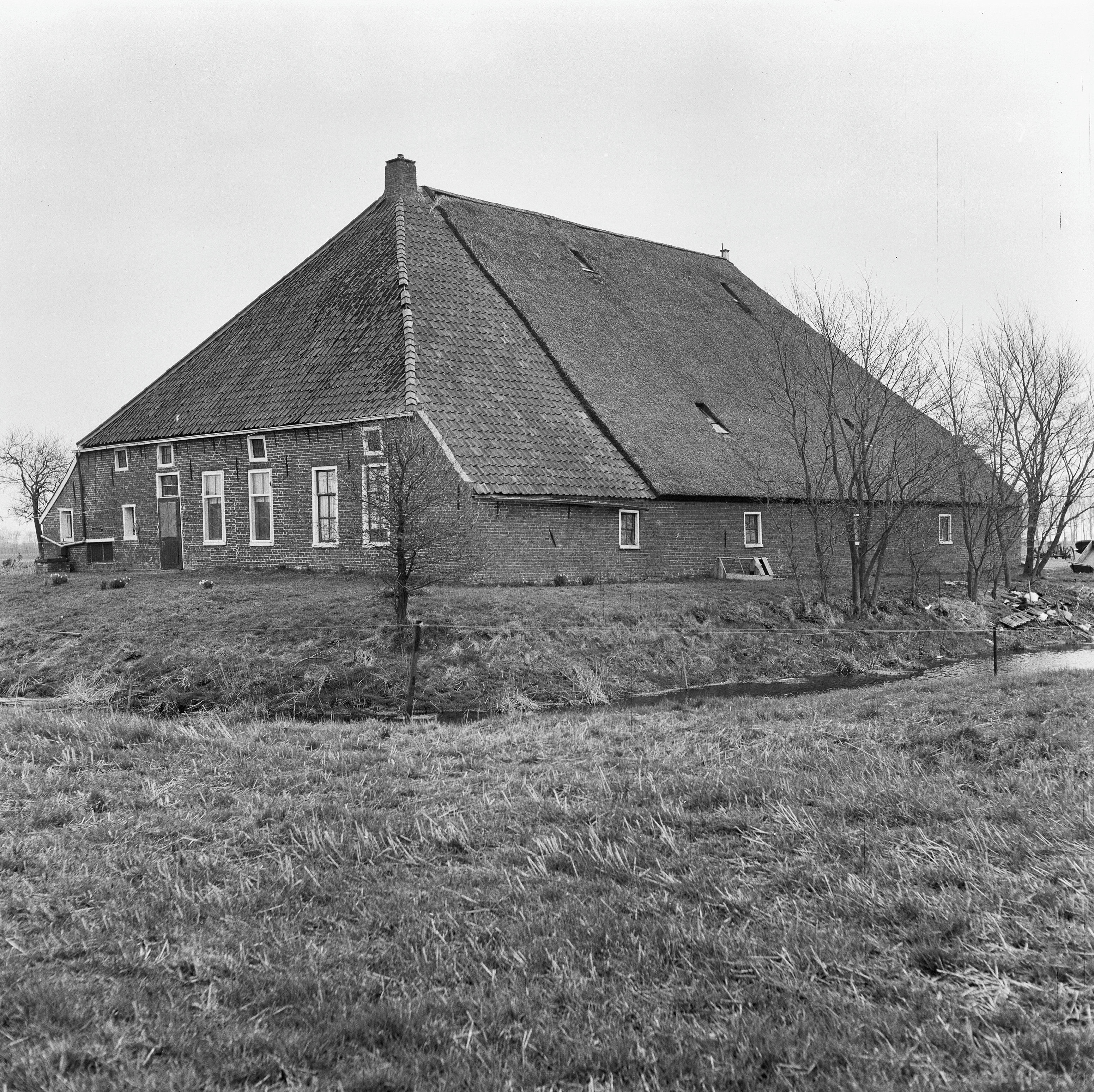 Diversen: nr.29 "Saaxumborg", overzicht